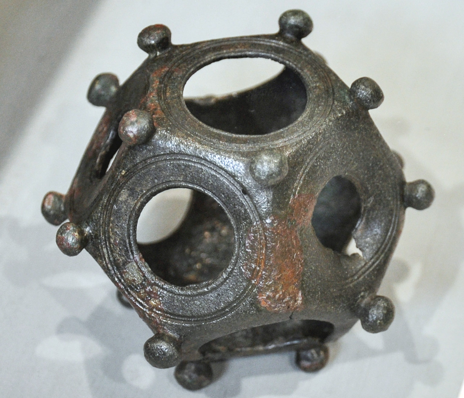 Dodécaèdre perlé, époque romaine, alliage cuivreux. Musée des beaux-arts et d'archéologie de Vienne.